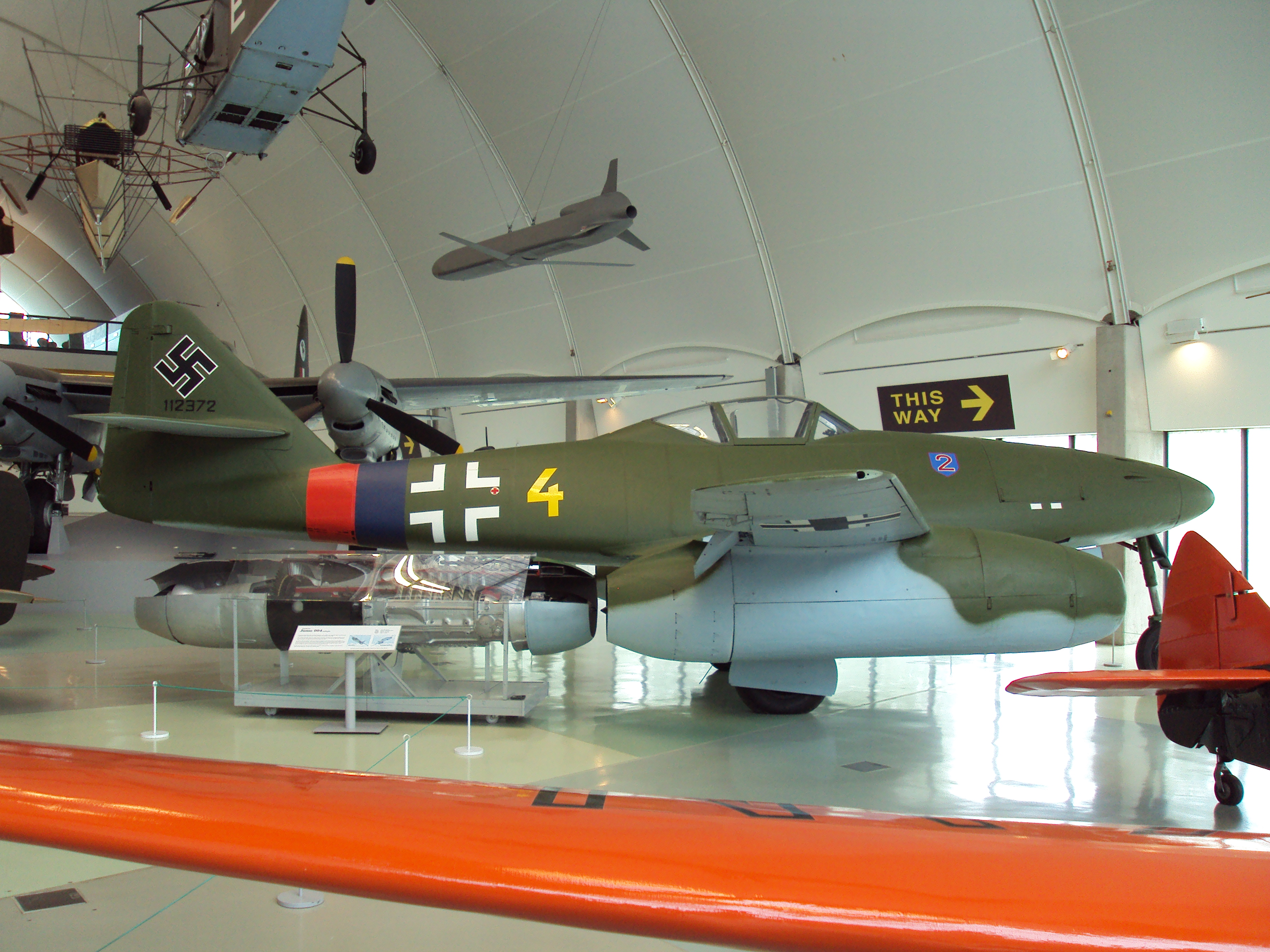 Messerschmitt Me 262 at the RAF Museum, Colindale, London.